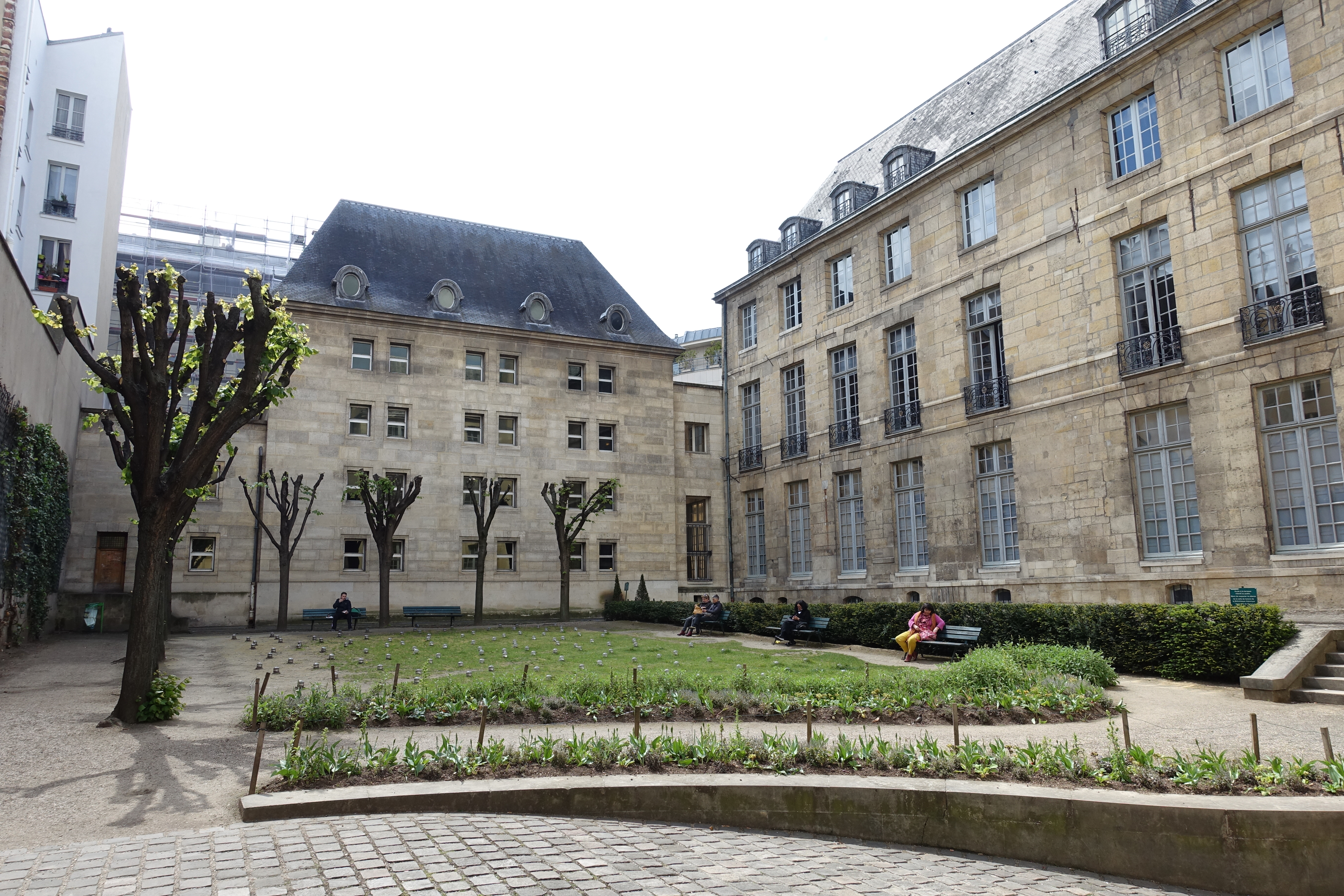 Jardin de l'Hôtel-Lamoignon - Mark-Ashton @ Le Marais @ Paris